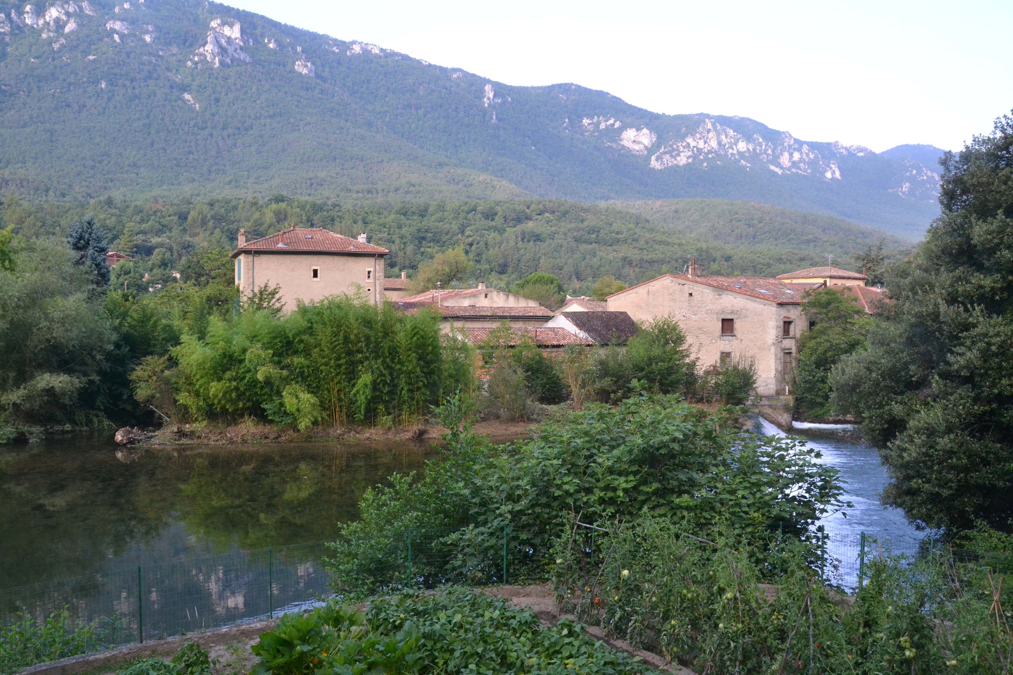 Cavirac, commune de Belvianes-et-Cavirac (Aude, France).